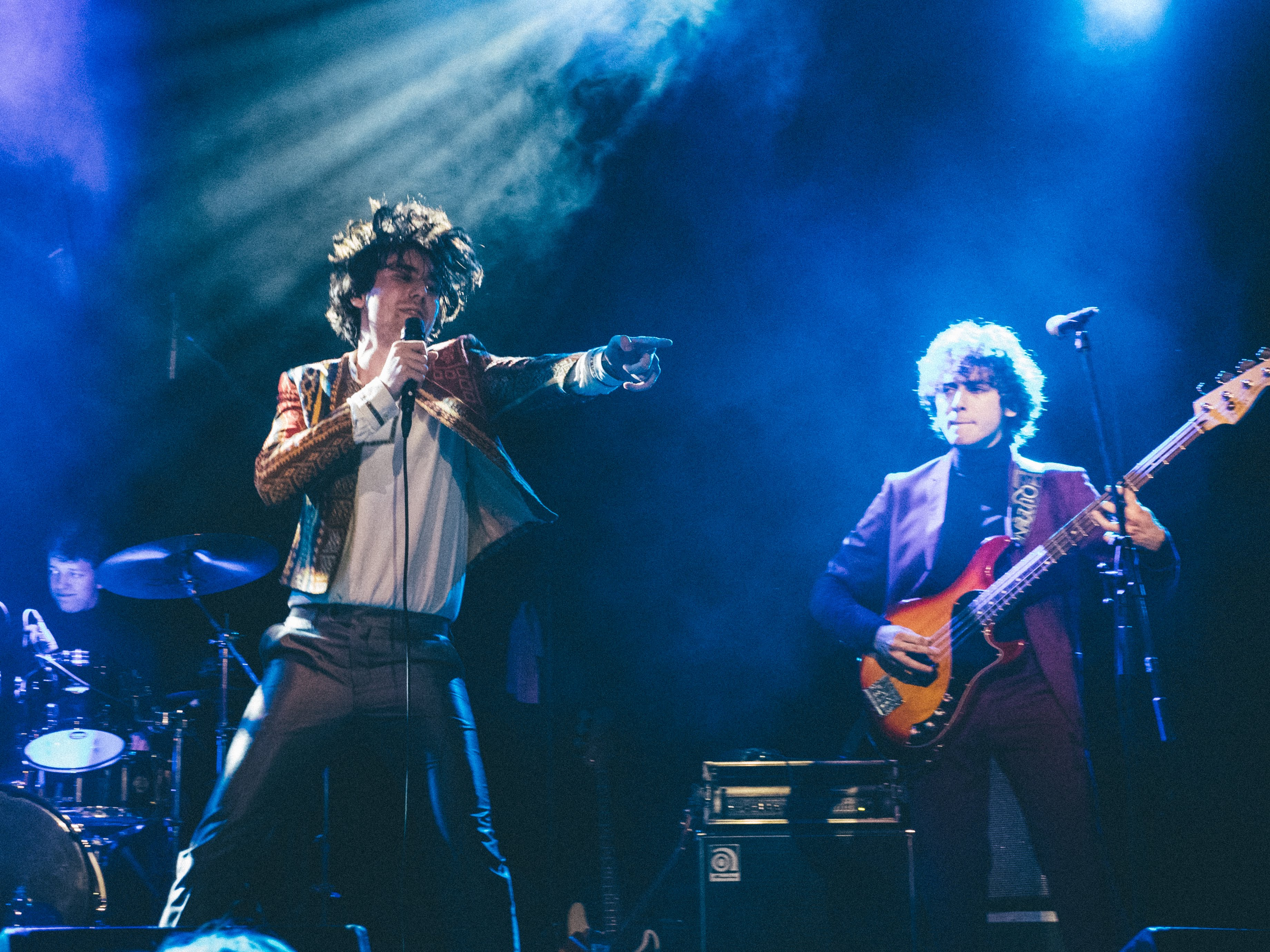 The Silver Spoons v Klub Roxy Praha